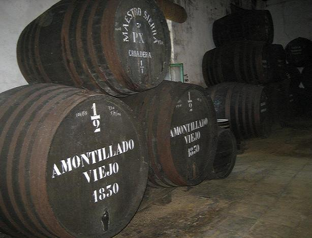 Foto de barril de amontillado, Bodega Maestro Sierra, Jerez.